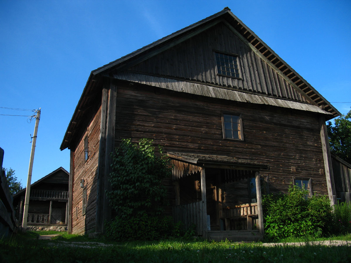 Беларуская (тарашкевіца): Даўні млын у Заслаўі